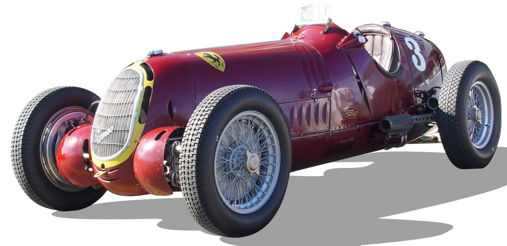 Alfa Romeo 8C-35 Scuderia Ferrari, taken by John Filiss of used with permission. This particular car is the one raced in the US Vanderbilt cup. Pictures of the car are on show at the Indianapolis Speedway Museum.